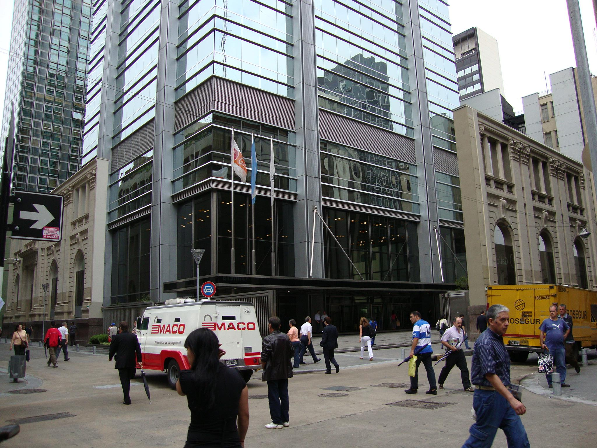 Base de la Torre Galicia Central, construida para el Banco Galicia entre 2001 y 2007. Se ven los laterales conservador del anterior edificio del Banco Español del Río de la Plata. Calles Tte. Gral. Juan D. Perón y Reconquista.